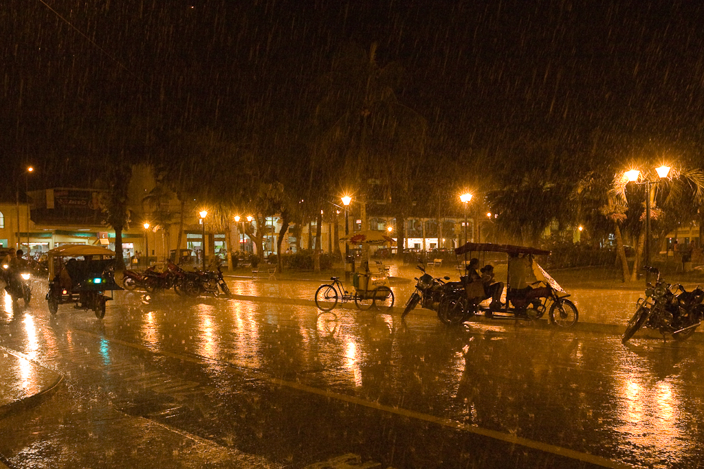 Acostumbrado escenario lluvioso en la Plaza de Armas de Iquitos.